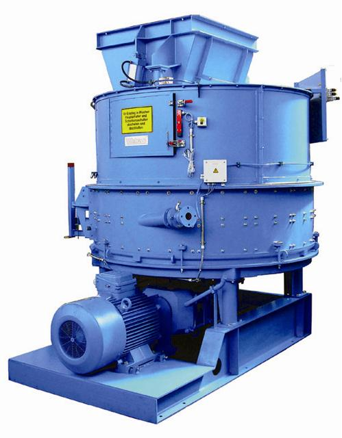 Mischer der Webac Gesellschaft für Maschinenbau